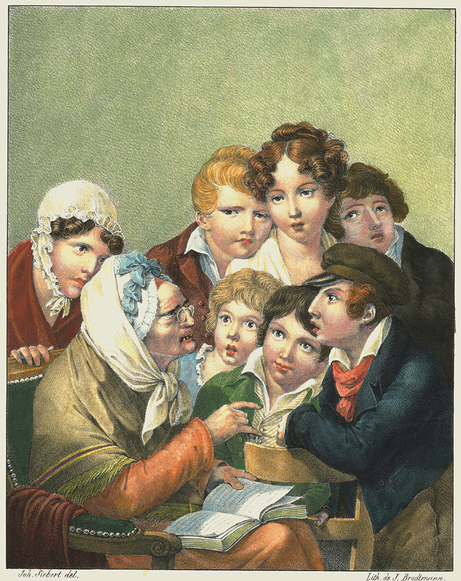 Geschichtenerzählerin, aus: "50 Bilder aus der Jugendwelt"